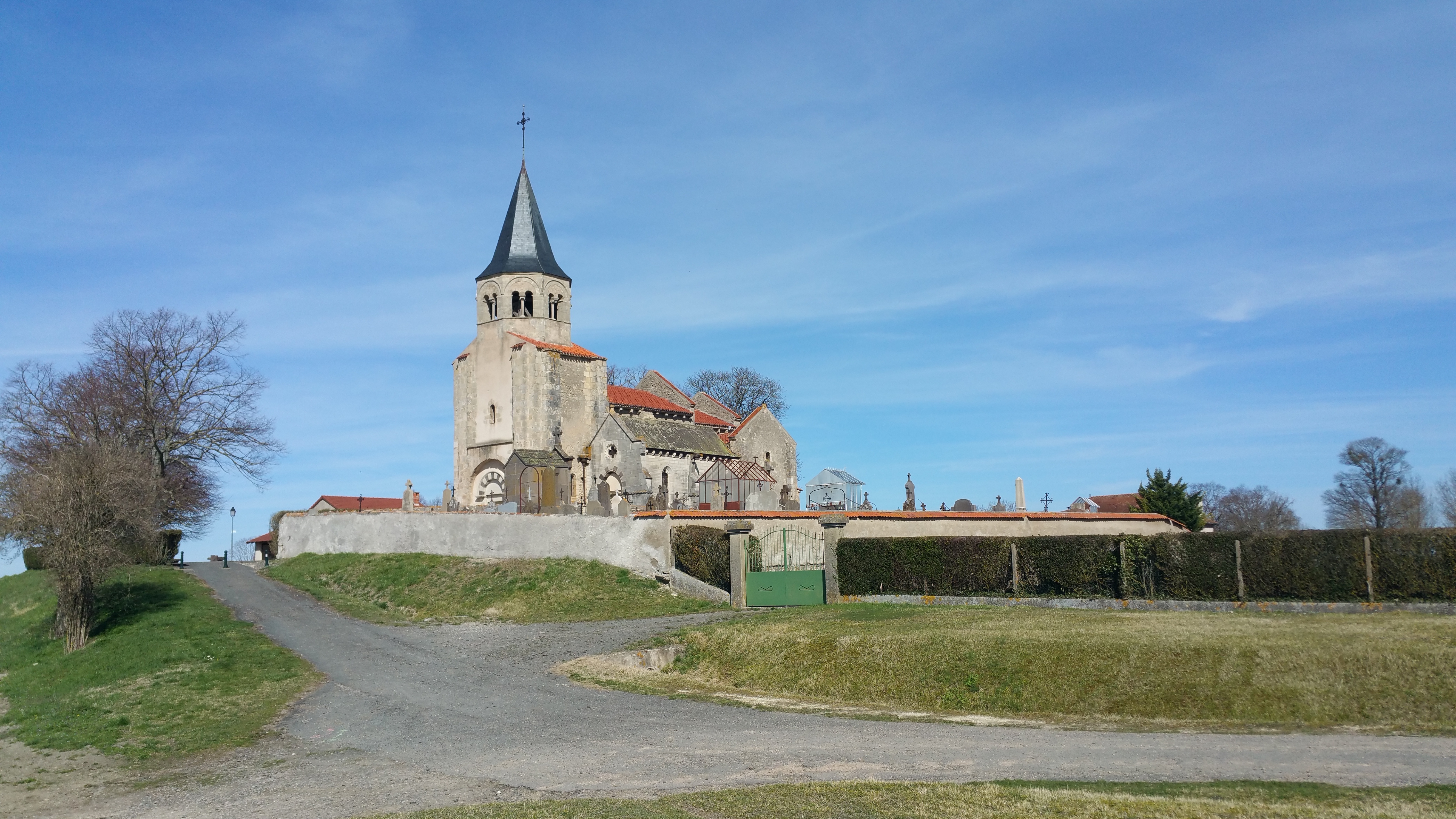 église Sainte-Radegonde de Cognat